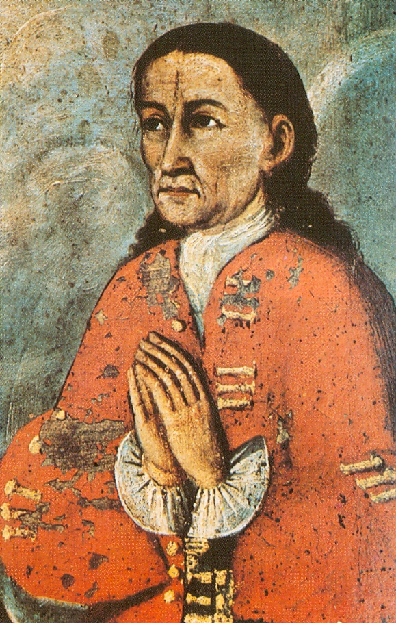 Detalle del retrato de Mateo Pumachua y su esposa